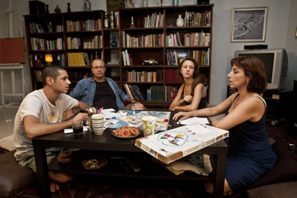 קטע מתוך הסרט "החיים בינתיים"